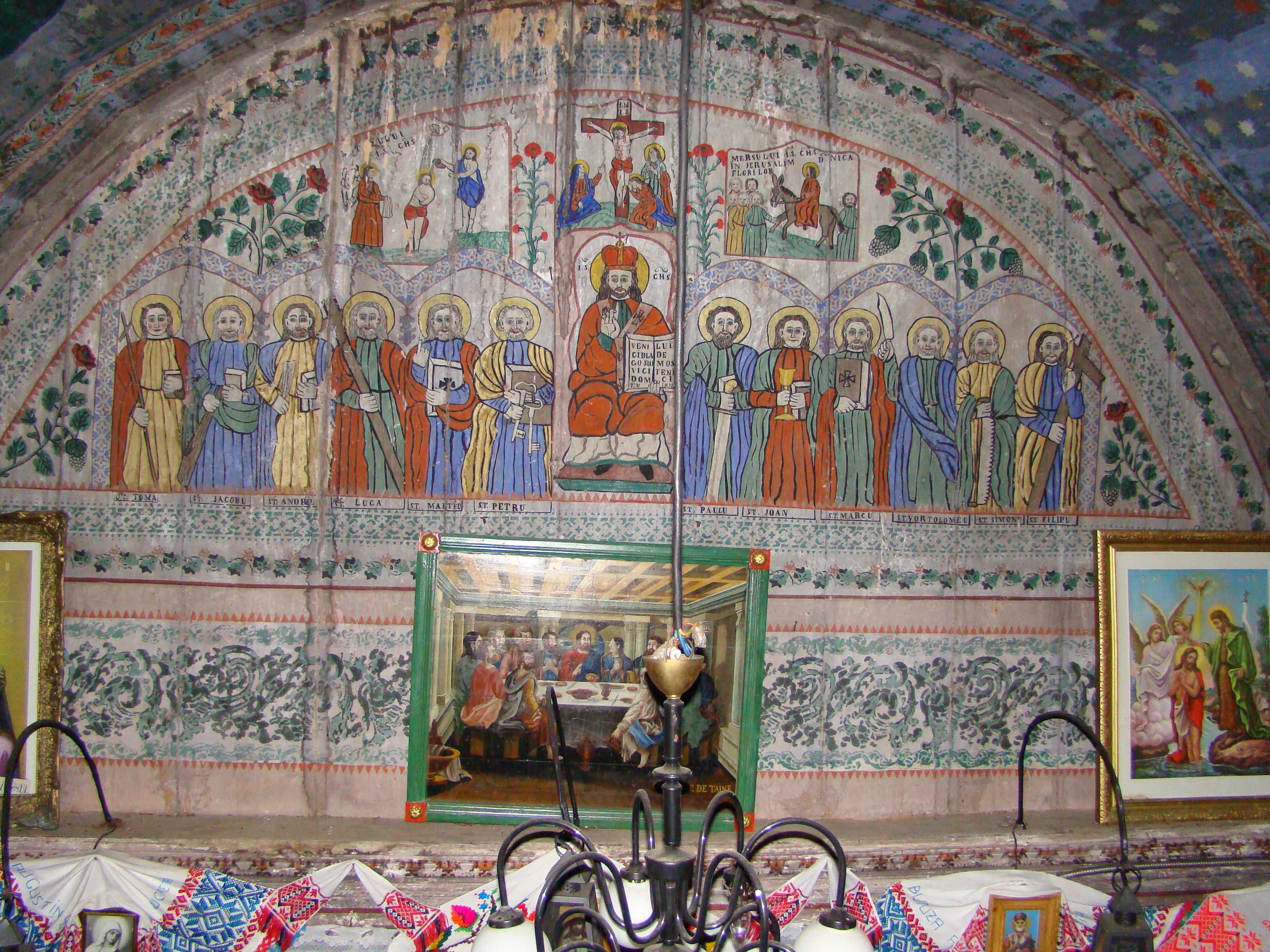 Biserica de lemn din Remecioara-interioare